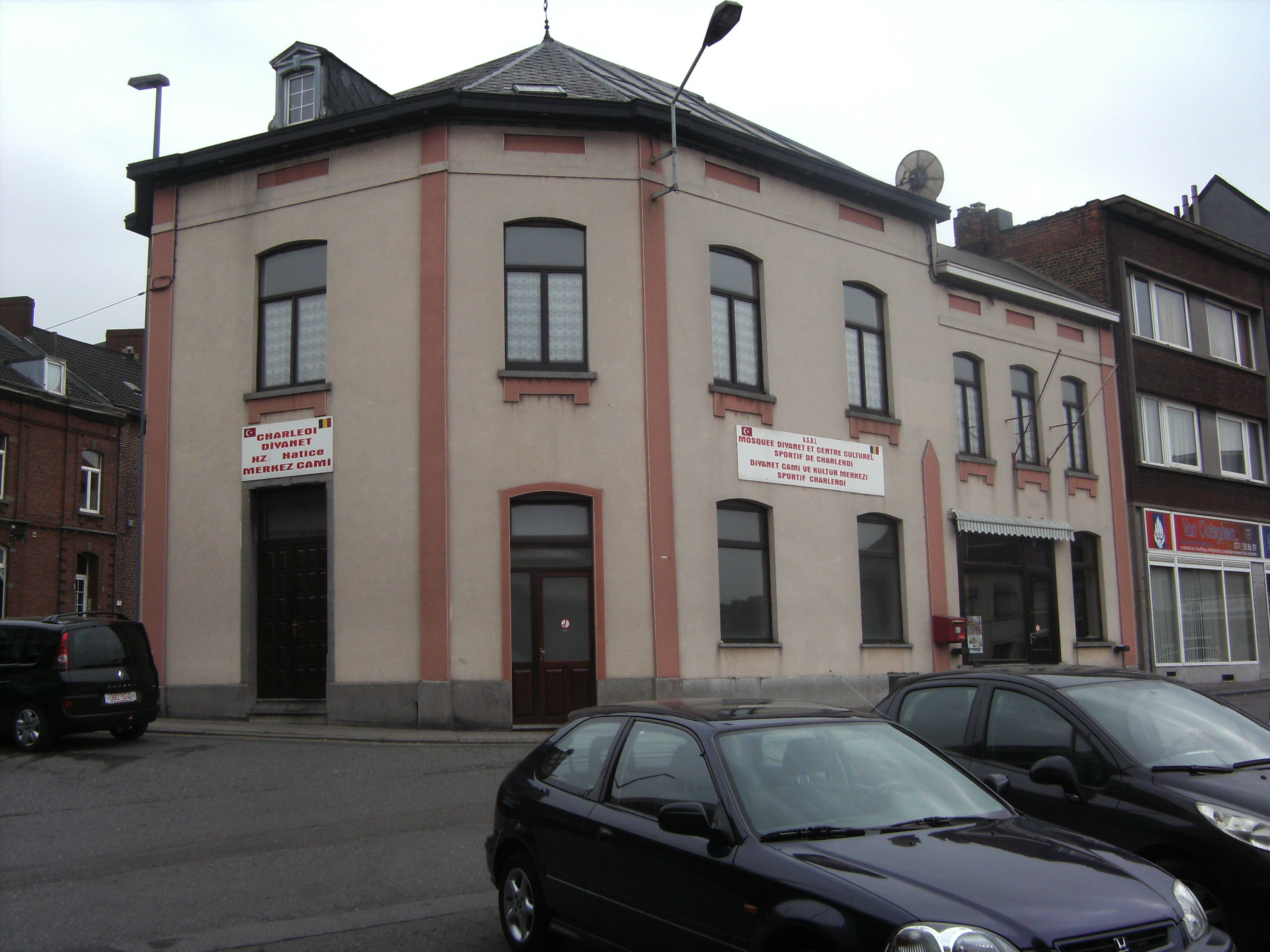 Charleroi (Belgique) - Broucheterre - place de la Broucheterre - mosquée turque. La communauté turque a depuis déménagée à la rue Pige au Croly située à proximité et le bâtiment est devenu mosquée et centre culturel islamique pakistanais.